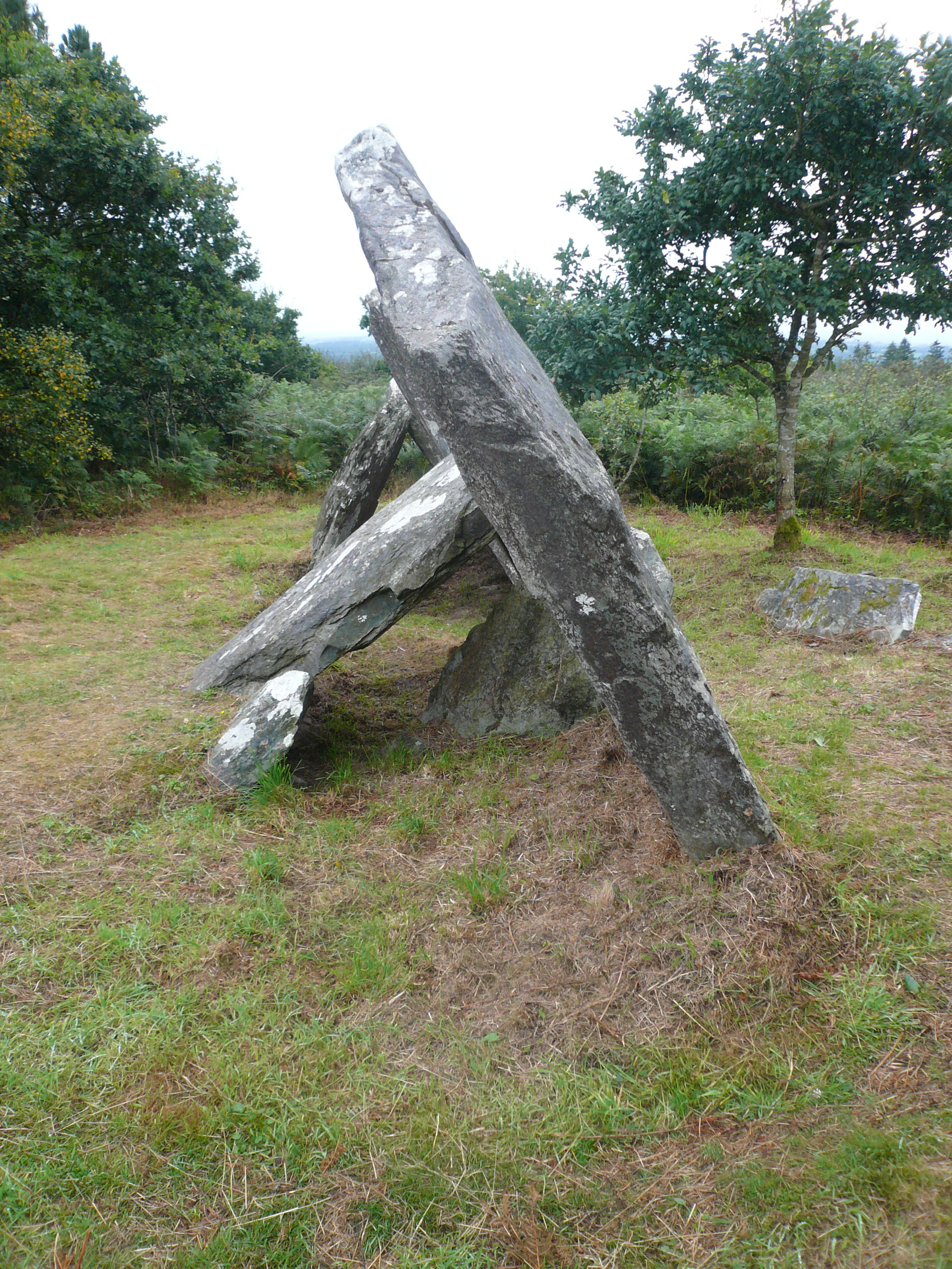 Vue longitudinale de l'Allée couverte de Castel-Ruffel en Saint-Goazec, Finistère, Bretagne, France.